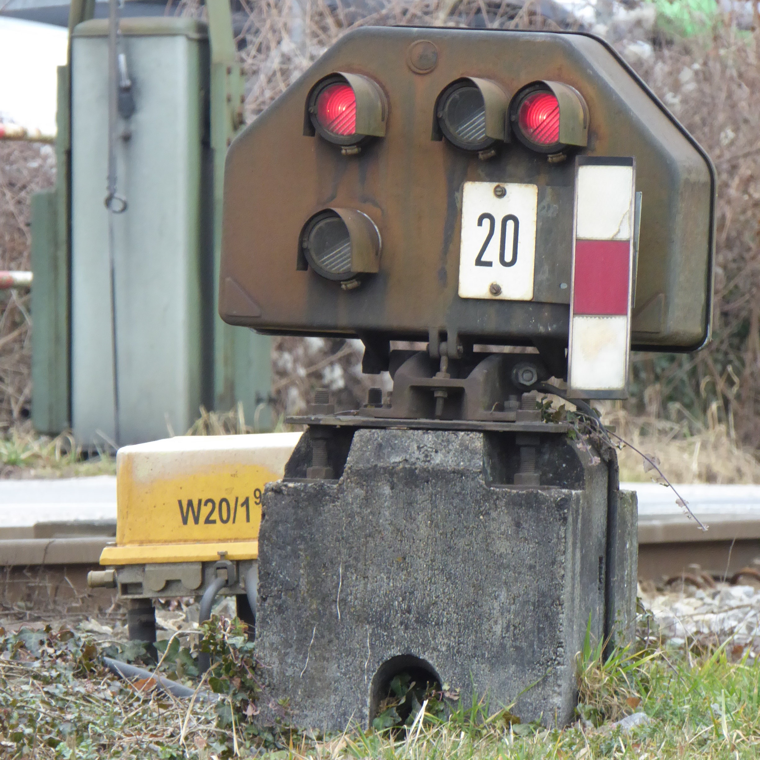 Zwergsignal ("Schotterzwerg") bei der Einfahrt in den Bahnhof Bad Aibling aus Richtung Rosenheim.